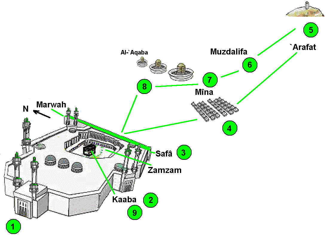 Etapes du pélerinage à La Mecque